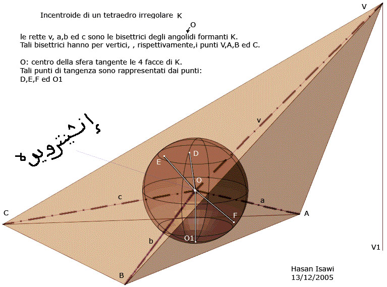 L'immagine visualizza l'incentroide di un poliedrotetraedrico. Questa immagine proviene dal sito personale di Hasan ISAWI (docente di geometria descrittiva all'Università "la sapienza" di Roma).